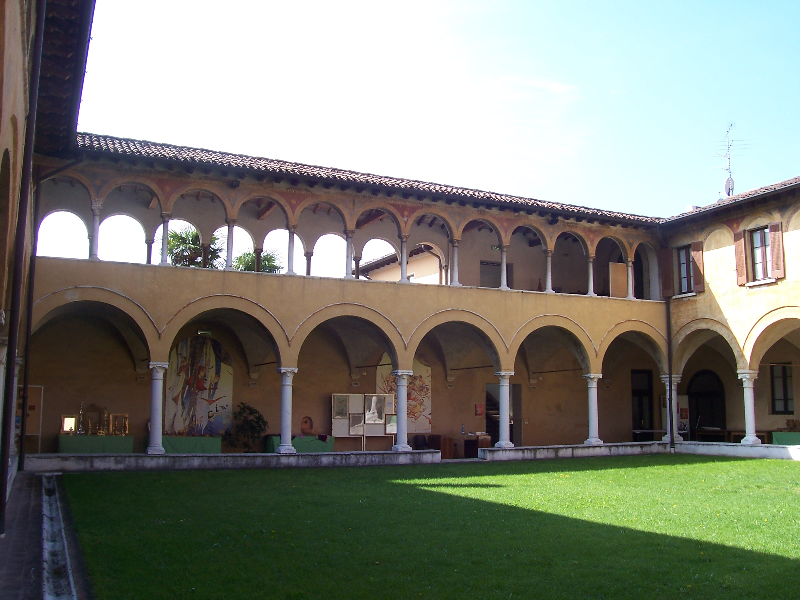 Santissimo corpo di cristo brescia chiostro maggiore2.jpg